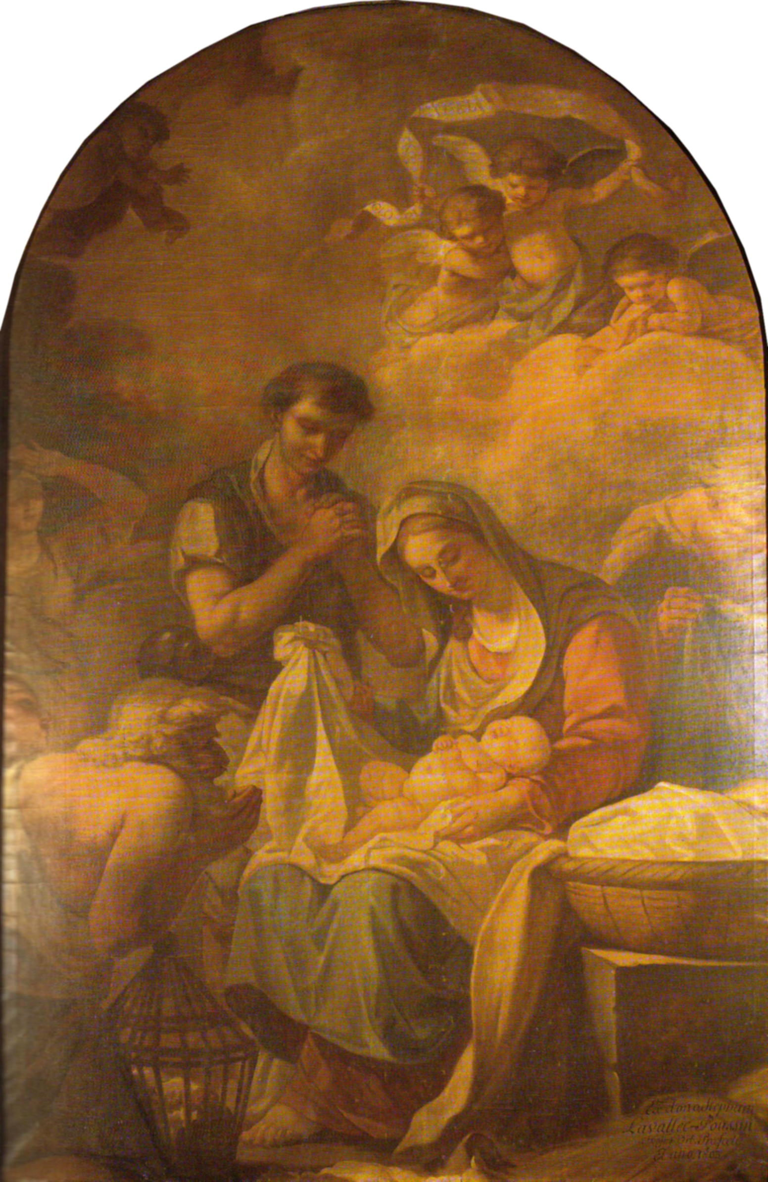 Huile sur toile. H=3,12 m, L=2,17 m. Tableau donné à la collégiale Notre-Dame de Poissy en 1803 par la veuve d'Étienne de La Vallée-Poussin.